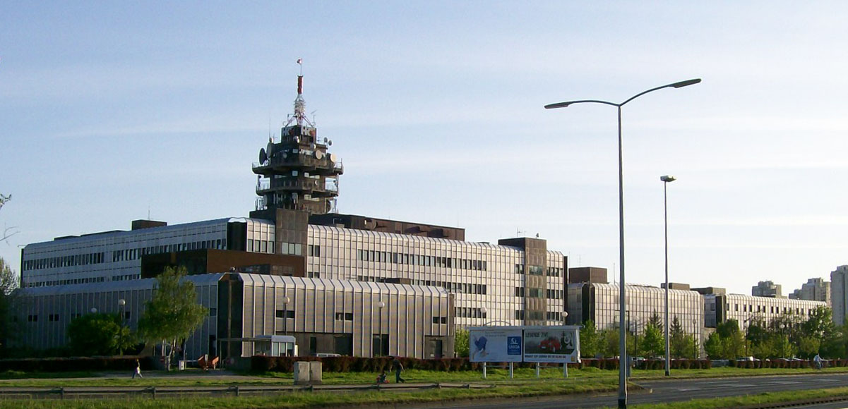 Zgrada HRT Zagreb